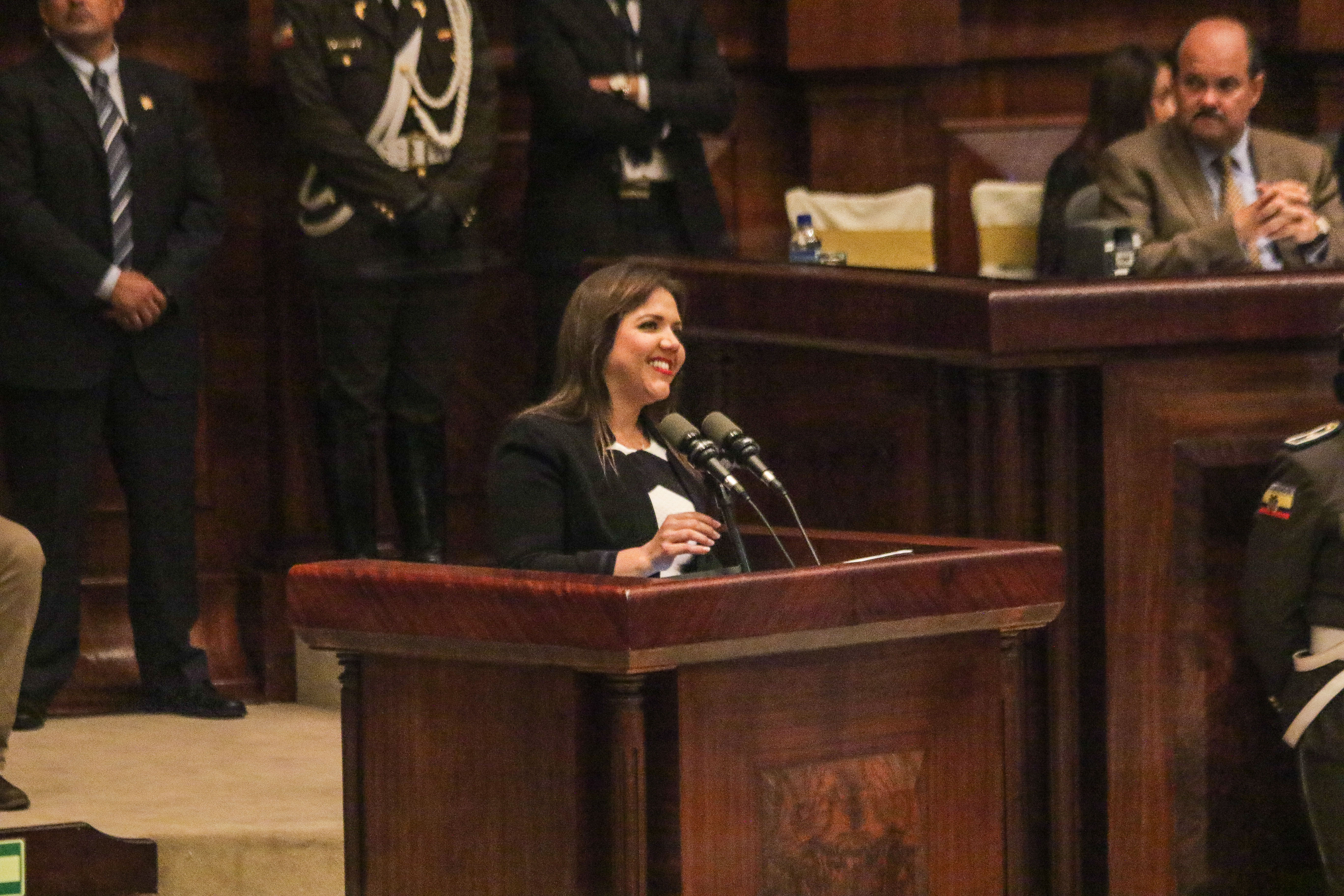 Quito 6 Ene (Andes).- En la Asamblea Nacional se dio la votación a favor de la designación de nueva vicepresidenta de la República otorgandole el cargo a Maria Alejandra Vicuña como nueva autoridad. Fotografías: Carlos Rodríguez/Andes. POSESIÓN VICEPRESIDENCIAL / MARIA ALEJANDRA VICUÑA POSESIÓN VICEPRESIDENCIAL / MARIA ALEJANDRA VICUÑA Quito 6 Ene (Andes).- En la Asamblea Nacional se dio la votación a favor de la designación de nueva vicepresidenta de la República otorgandole el cargo a Maria Alejandra Vicuña como nueva autoridad. Fotografías: Carlos Rodríguez/Andes. POSESIÓN VICEPRESIDENCIAL / MARIA ALEJANDRA VICUÑA